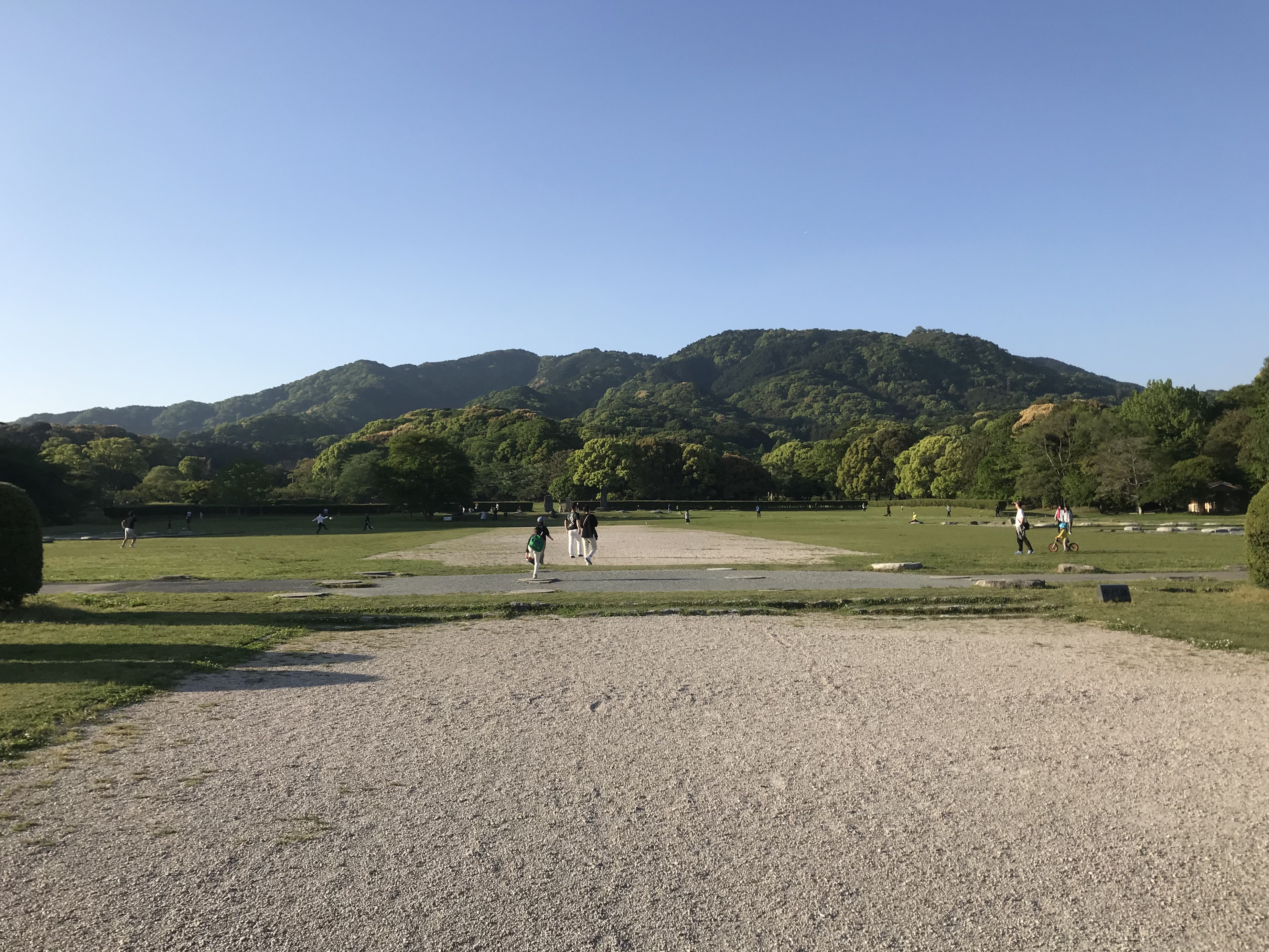 大宰府の中門跡